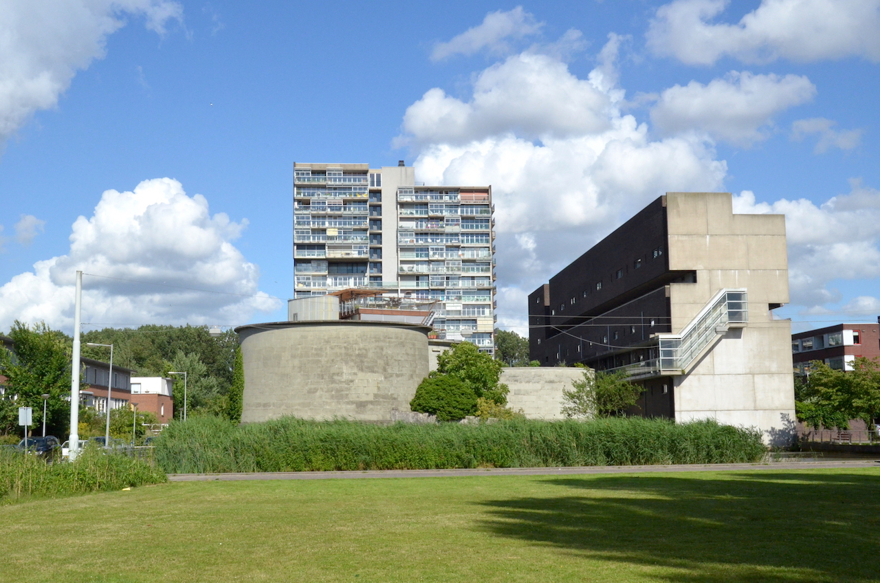 Woongebouwen 'Zuiveringspark'. Foto: Erik Swierstra.